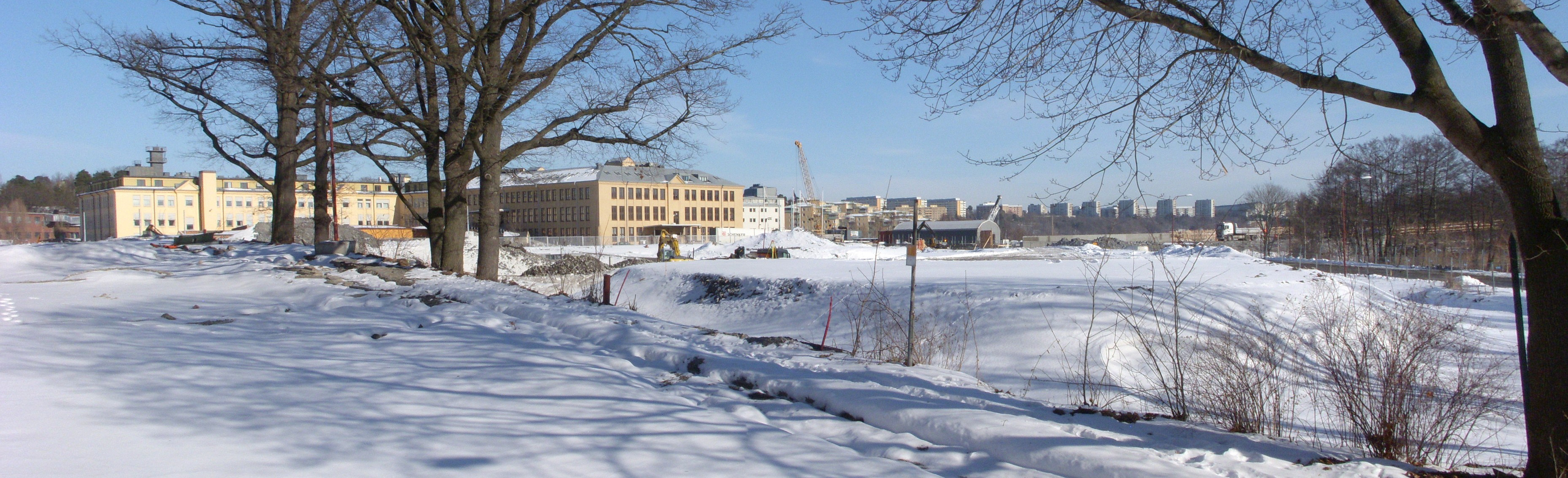 Johannesfred Ulvsunda, panorama